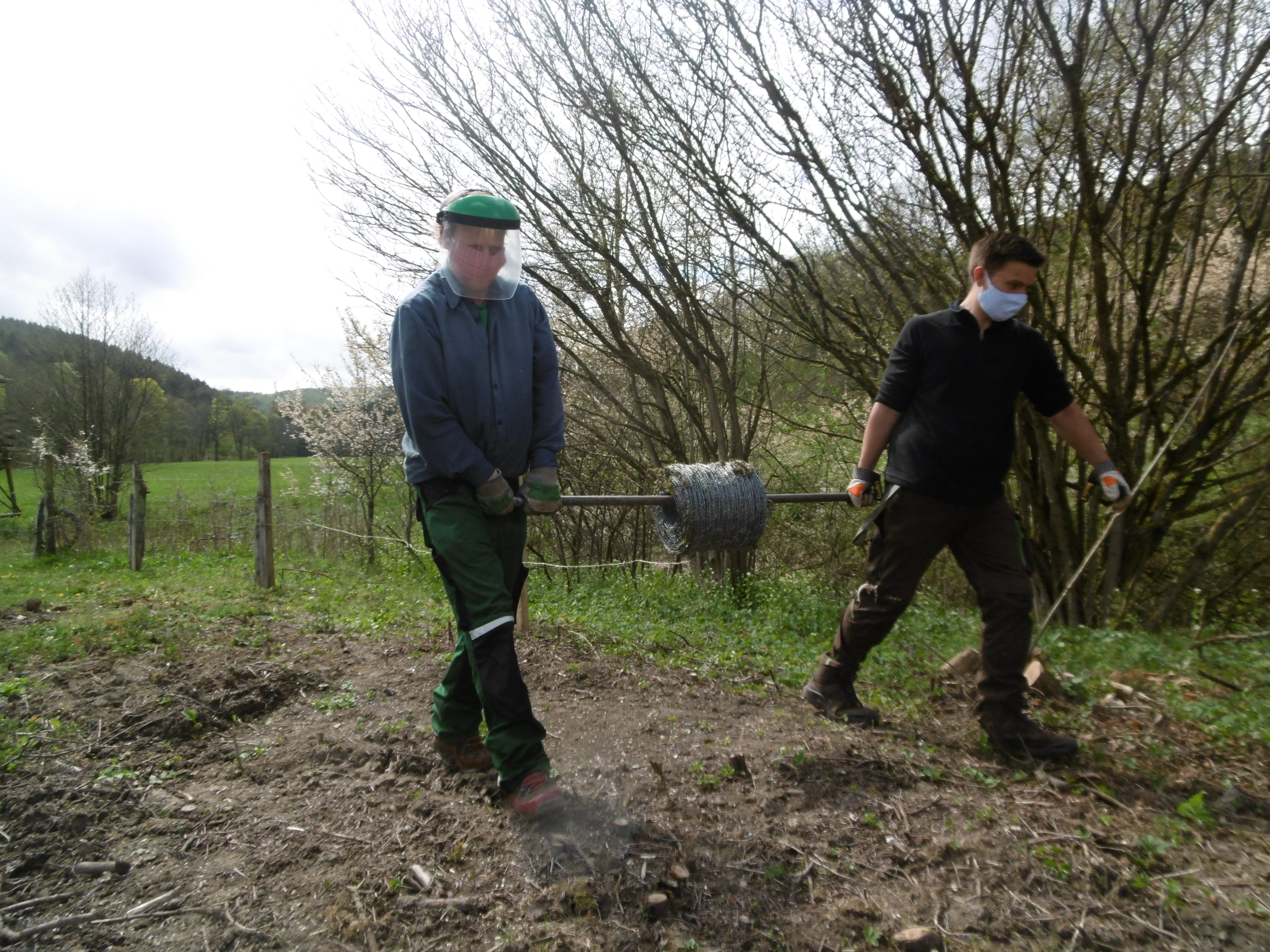 Mitarbeiter vom Landschaftspflegetrupp der Biologischen Station Hochsauerlandkreis bei Zaunbau, hier abrollen von Stacheldraht, Naturschutzgebiet Mittleres Hoppecketal; Wegen COVID-19-Pandemie arbeit mit Alltagsmaske bzw. einer zusätzlich mit Schutzvisier.